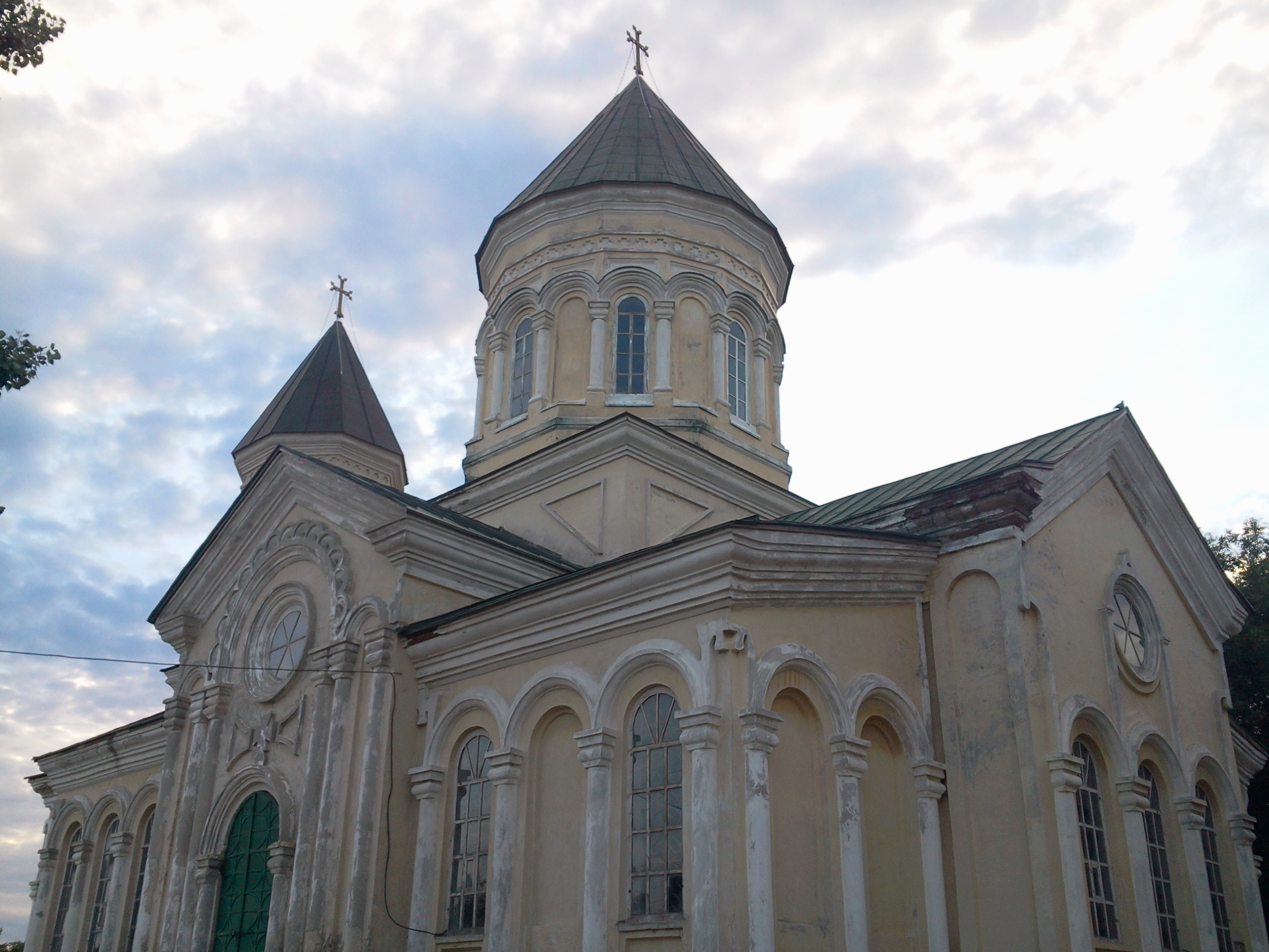 Церковь Сурб-Аменапркич: центр, Крым, Мясниковский район, Ростовская область